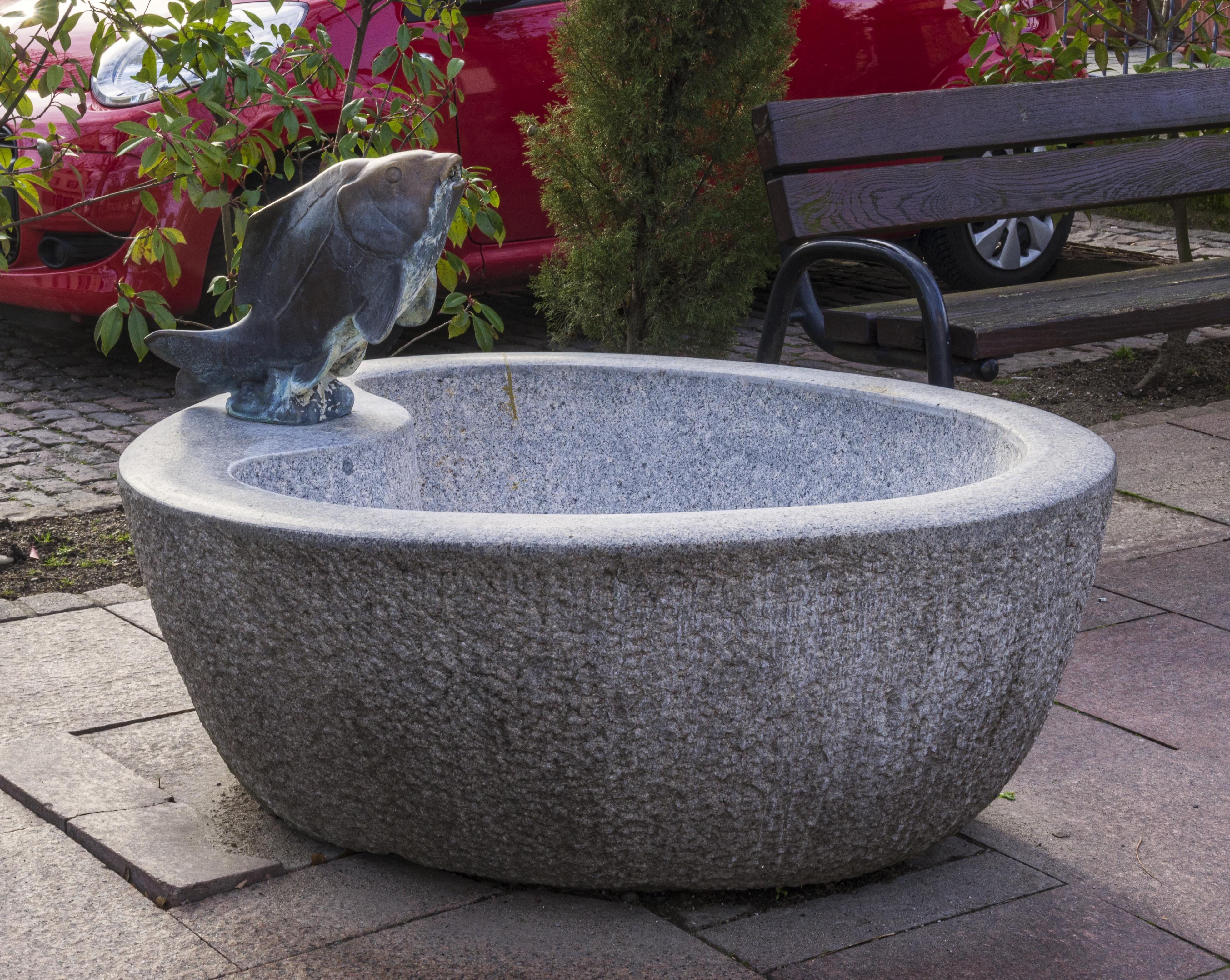 Bilder aus Neuenburg am Rhein Der Fischbrunnen erinnert an den früher wichtigen Gewerbezweig der Rheinfischerei